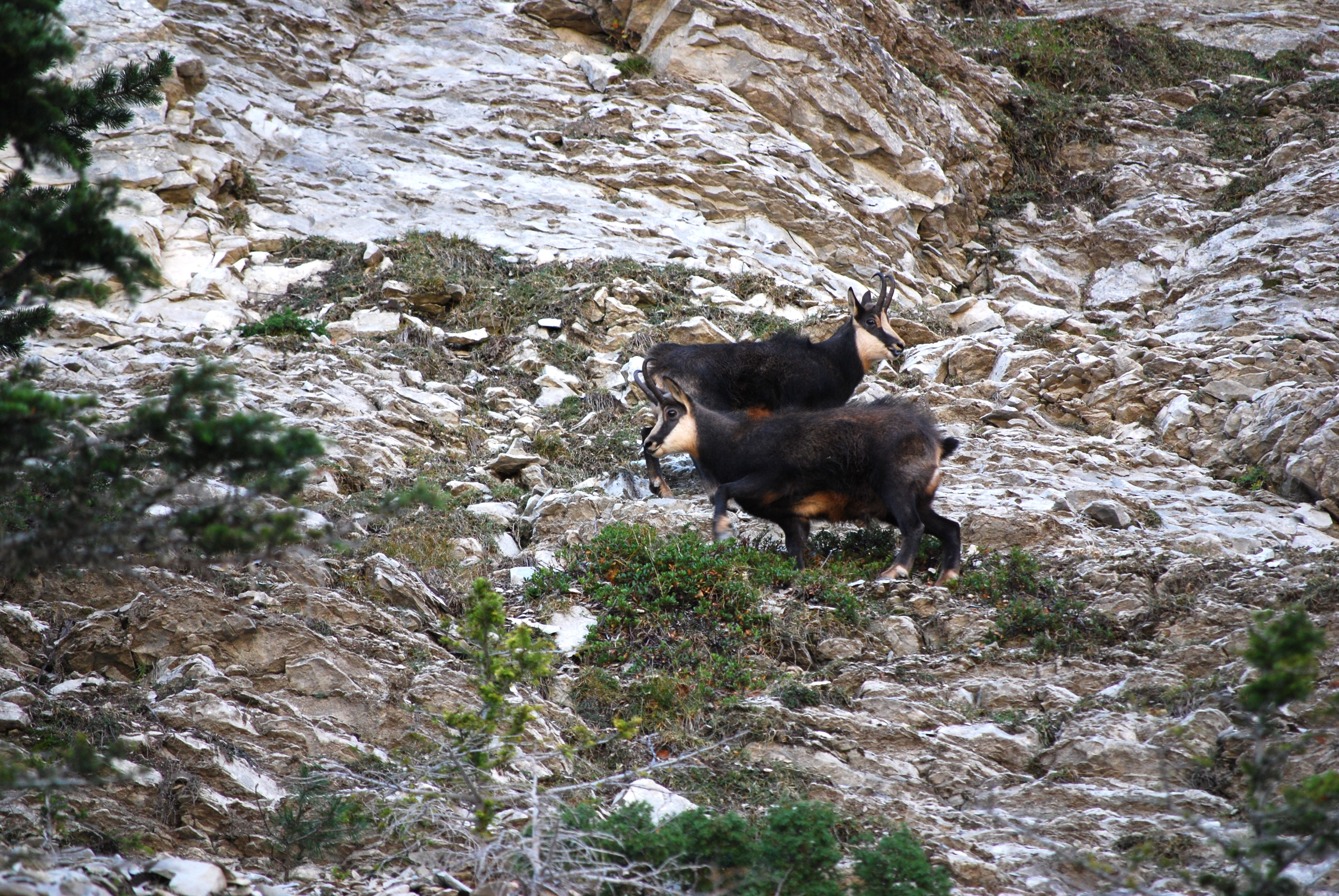 Rupicapra rupicapra